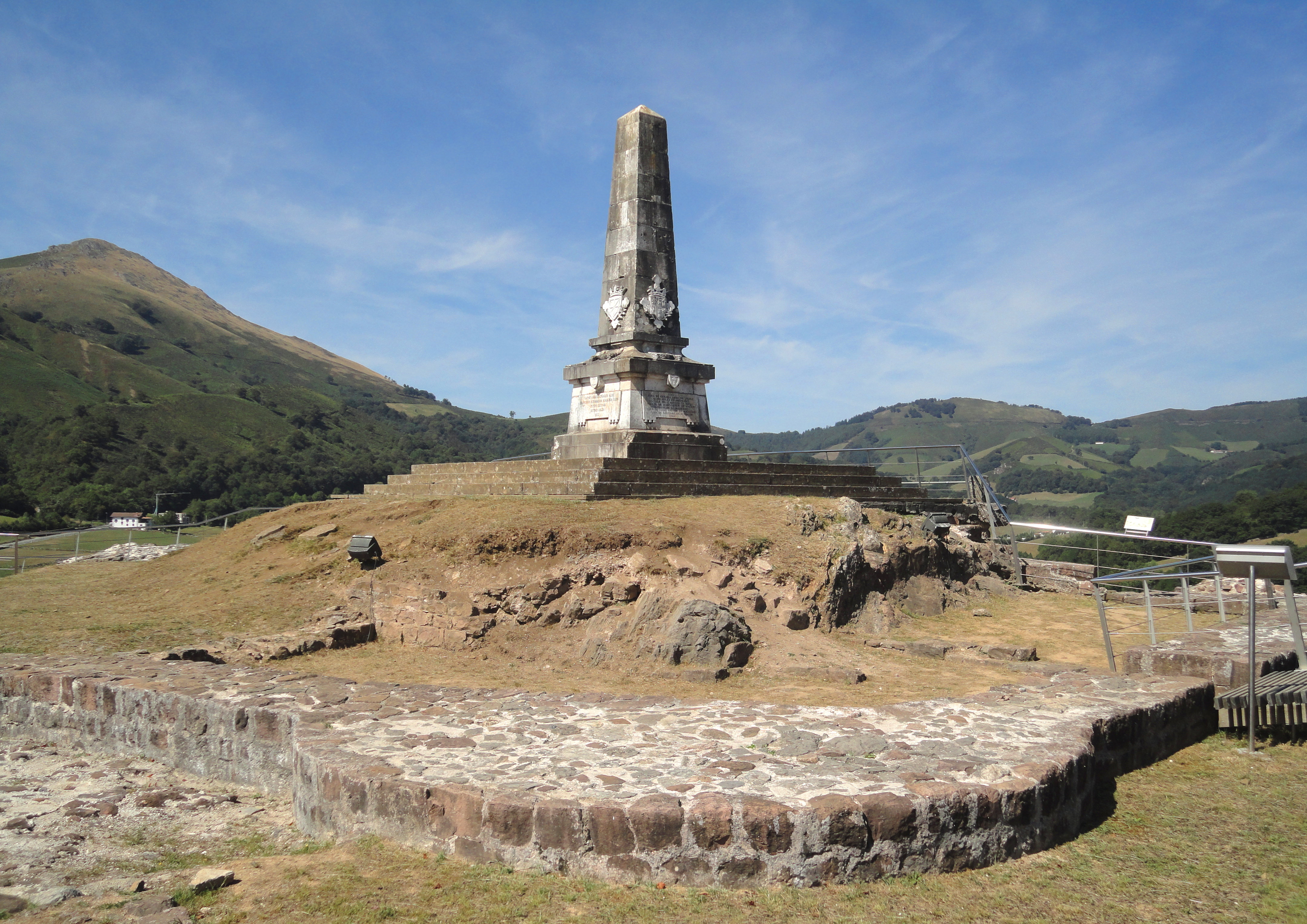 Amaiurko gazteluko monolitoa